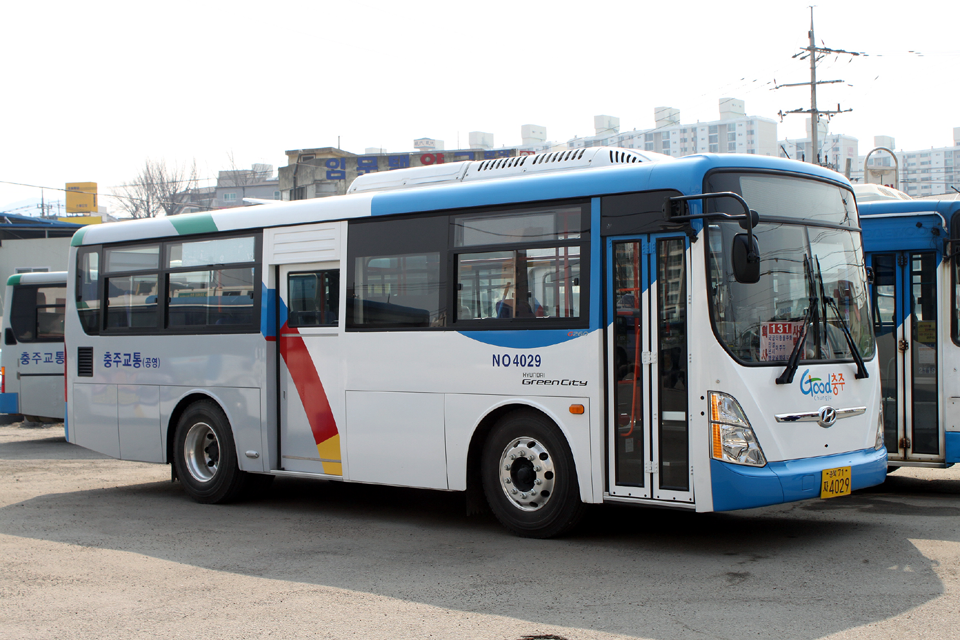 충주교통에서 운행 중인 현대 그린시티